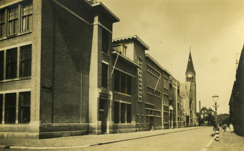 Gezicht in de Christiaan de Wetstraat, op de achtergrond de Sint-Franciscuskerk aan de Paul Krügerstraat, hoek Afrikaanderplein. Nummer: PBK-2005-820 Beschrijving: Gezicht in de Christiaan de Wetstraat, op de achtergrond de Sint-Franciscuskerk aan de Paul Krügerstraat, hoek Afrikaanderplein. Datering: 1943 Toegangsnummer: 4029 Collectie: Prentbriefkaarten verzameld door het Stadsarchief Rotterdam Auteursrechthouder: Anoniem; Gebu Auteursrechtelijk beschermd: Nee Documentsoort: Prentbriefkaart Downloadbaar: Ja Uitgever: Gebu